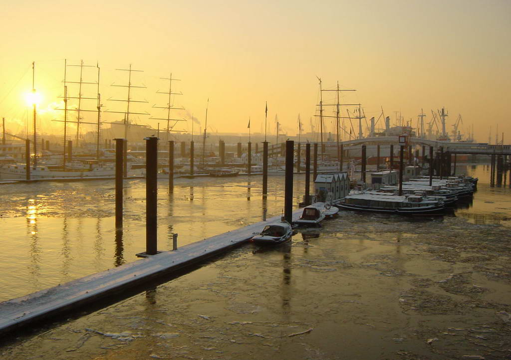 Der Niederhafen in Hamburg-Neustadt im Winter